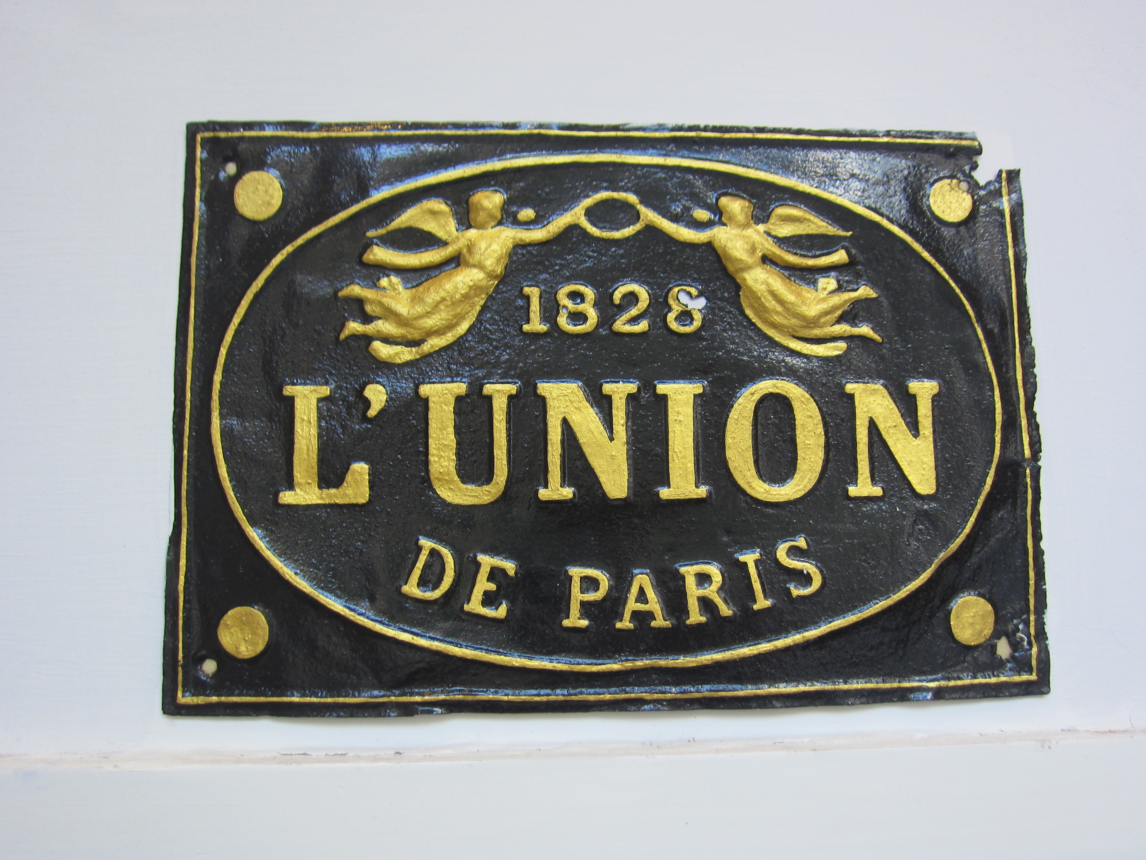 הרצלילינבלום - מוזיאון לבנקאות ונוסטלגיה תל אביבית הוא מוזיאון להיסטורית הבנקאות בתל אביב ובארץ ישראל. המוזיאון הוקם בתל אביב על ידי בנק דיסקונט. המוזיאון הוקם ב"בית שיף" בקרן הרחובות הרצל ולילינבלום. הקומה הראשונה של הבית נבנתה בשנת 1909 כבית מגורים פרטי של משפחת פרנק, בחלקה שבה זכתה בהגרלת המגרשים לאחוזת בית. לאחר מכן נמכר הבית למשפחת שיף ובשנת 1924 נוספו לו שתי קומות.